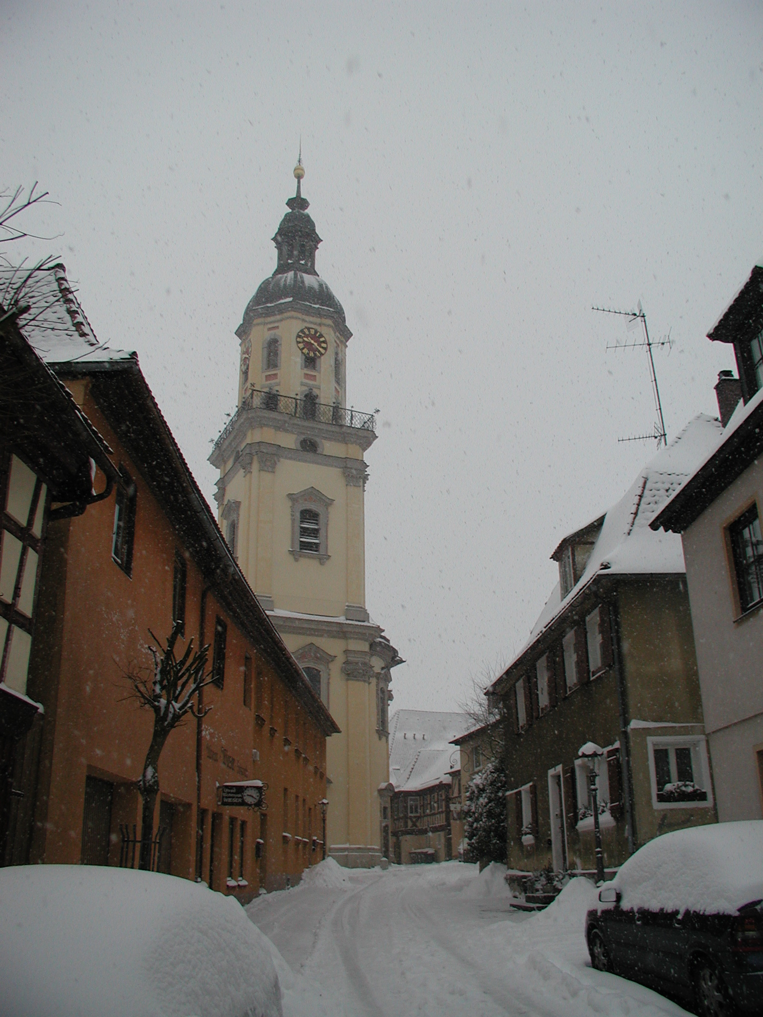 Hauptkirche Wilhermsdorf